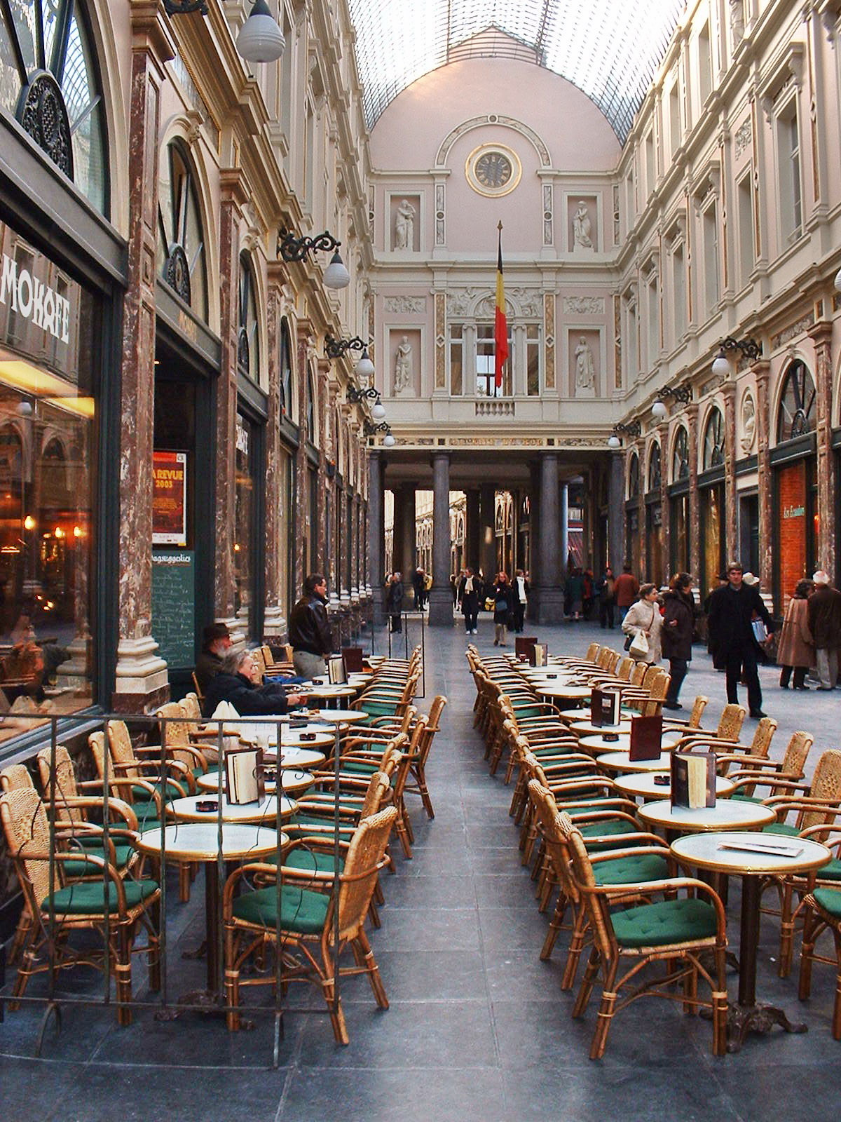 Café, Gallieries Royales Saint-Hubert, Bruxells, Belgium. Taverne du Passage